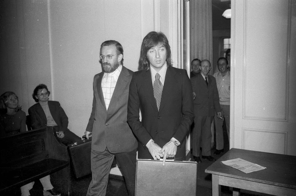 Der Chef des Pop-Chors "Les Humphries Singers", Humphries (rechts), wird vom Kieler Schöffengericht von der Anklage der Körperverletzung freigesprochen.